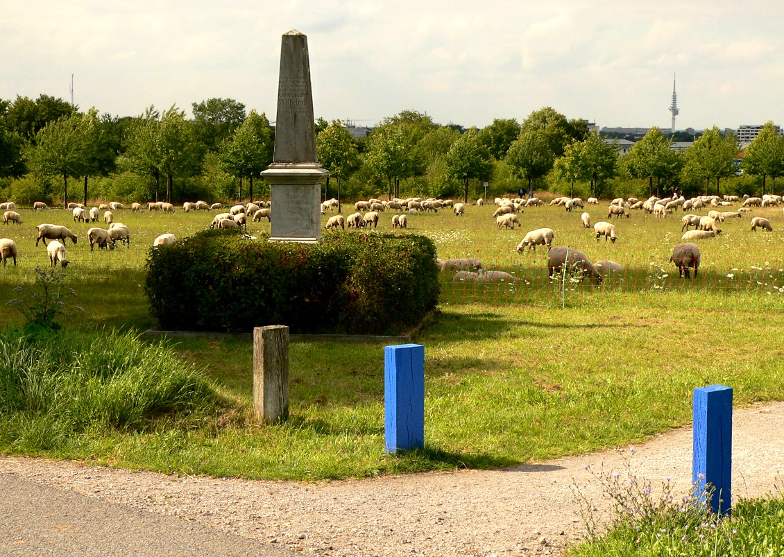 Paradestein am Kronsberg und blaue Markierungen Grüner Ring. Inschriften:1.) Errichtet / im September / 1889 / von den Patrioten / der Umgegend2.) Zur Erinnerung / an die / drei grossen Paraden / abgehalten / von den / Deutschen Kaisern / Wilhelm I. und Wilhelm II.3.) Heerschau / über / das X. Armeekorps / unter / Kaiser Wilhelm I. / in Begleitung des Kronprinzen / des späteren Kaisers / Friederich / am 14. September 1874 / und / am 2. September 18814.) Heerschau / über / das X. Armeekorps / unter / Kaiser Wilhelm II. / am 13. September 18895.) Die grosse Parade / des X. Armeekorps / u. Kavallerie-Division / vor seiner Majestät / des Kaiser und Königs / Wilhelm II / fand statt am 27. August 1907 [4. Parade, Inschrift offensichtlich später hinzugefügt]